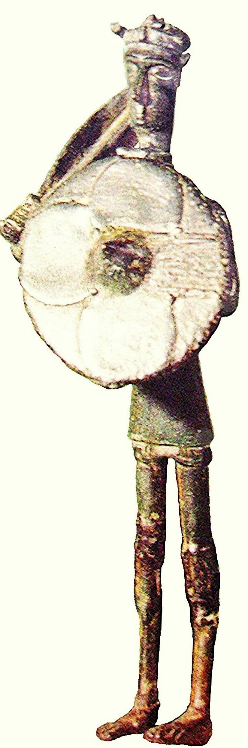 Cagliari - Sardinia- Italy - Museo Archeologico Nazionale - Bronzetto nuragico By --Shardan 16:50, 14 September 2007 (UTC)